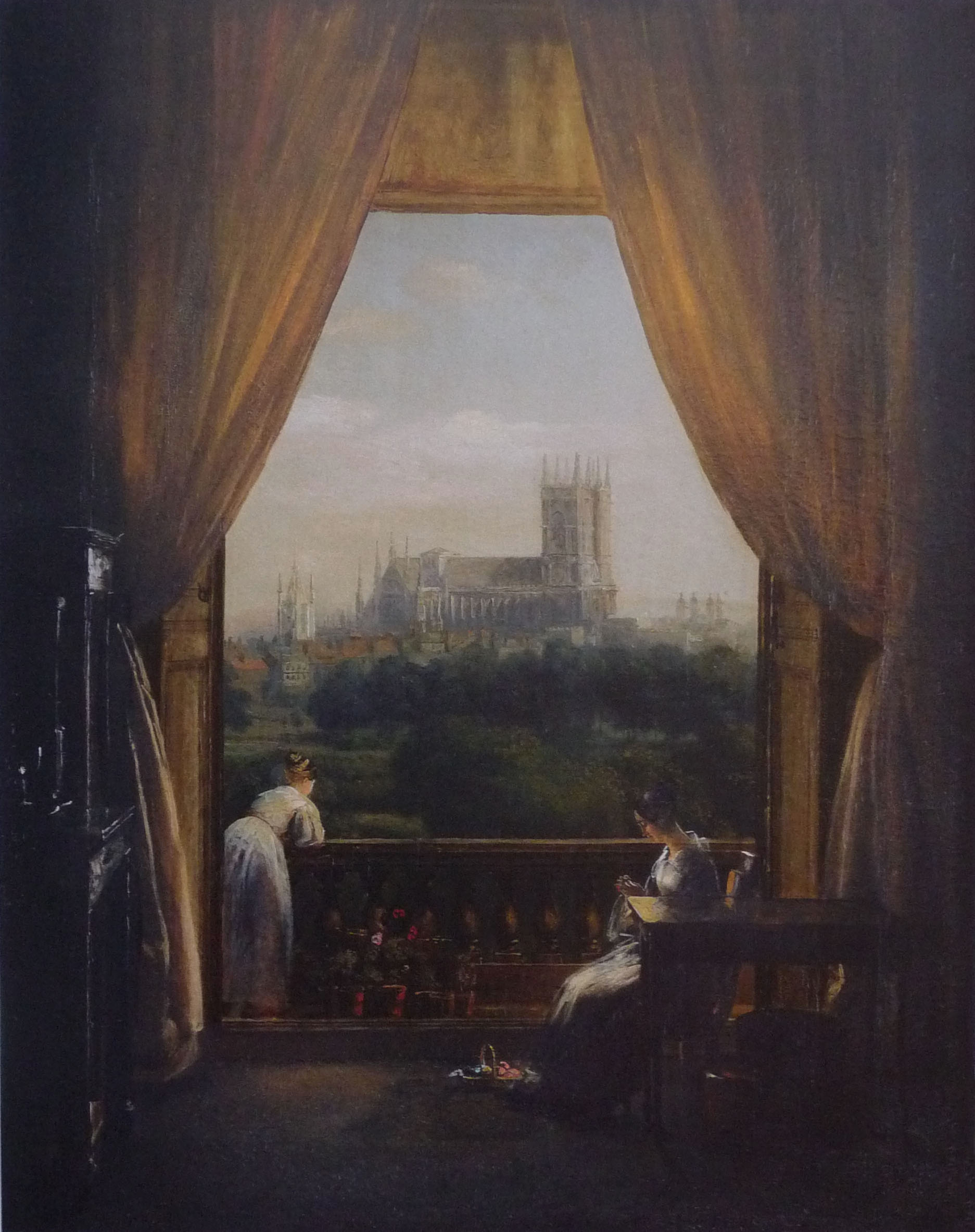 Intérieur londonien, Louis Pierre Spindler, 1834-1836, huile sur toile, Musée des beaux arts de Strasbourg.